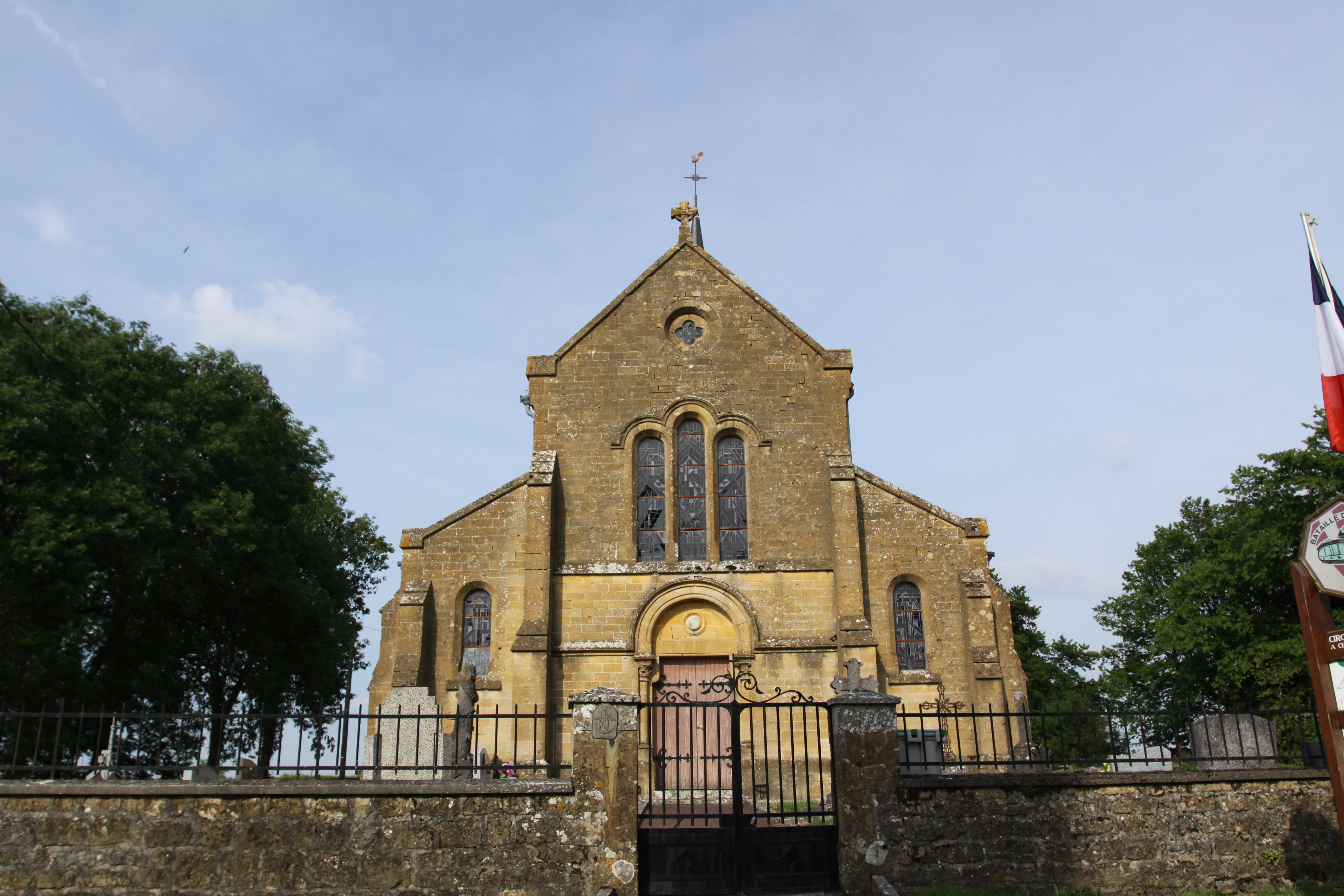 Village Ardennais